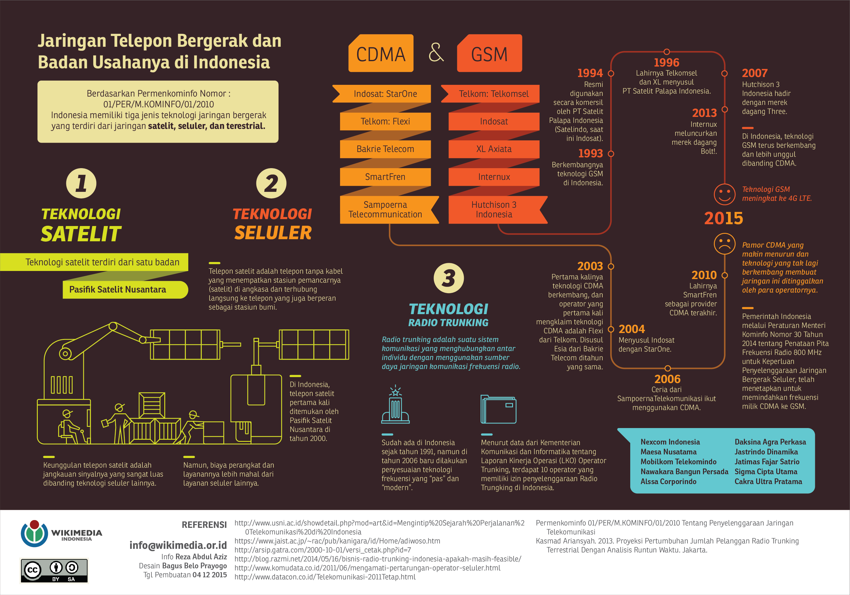 Infografis ini disusun untuk menginformasikan kepada publik tentang perkembangan jaringan telepon bergerak dan badan usahanya di Indonesia. Seiring waktu berjalan dan berkembangnya teknologi telekomunikasi, badan usaha telekomunikasi di Indonesia tidak hanya terdiri dari operator telepon kabel, tapi juga seluler.